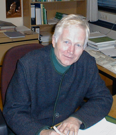 Burghard von Lüpke Urheber: Holodeck